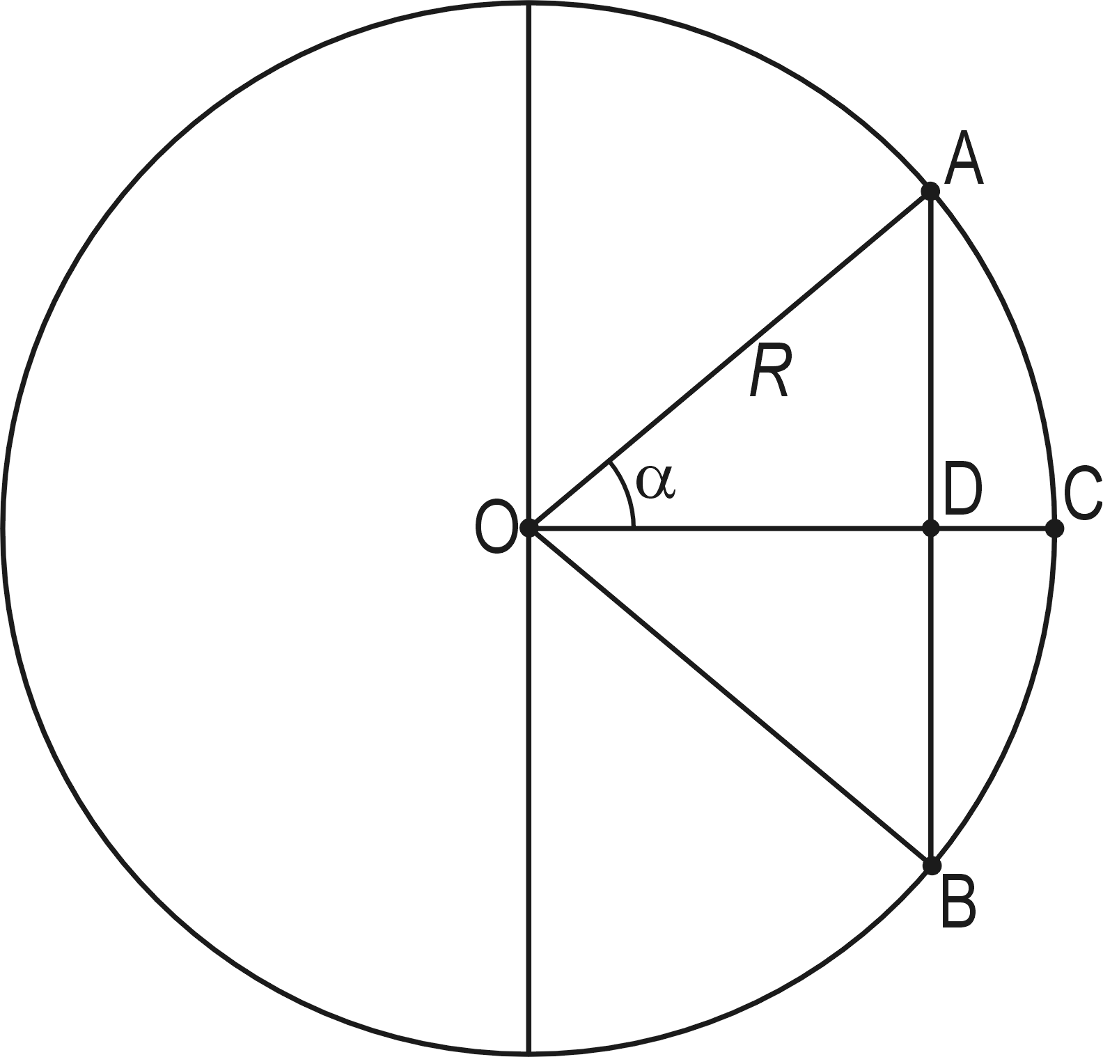 Окружность для определения древних тригонометрических функций